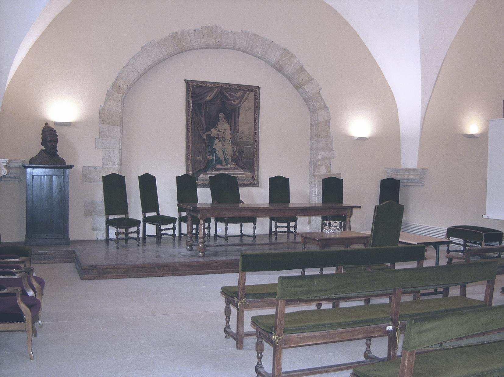 Salle des actes de l'UFR de Droit de Montpellier (Hérault). Photographie personnelle